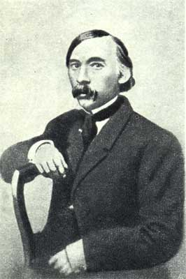 Дуров, Сергей Фёдорович